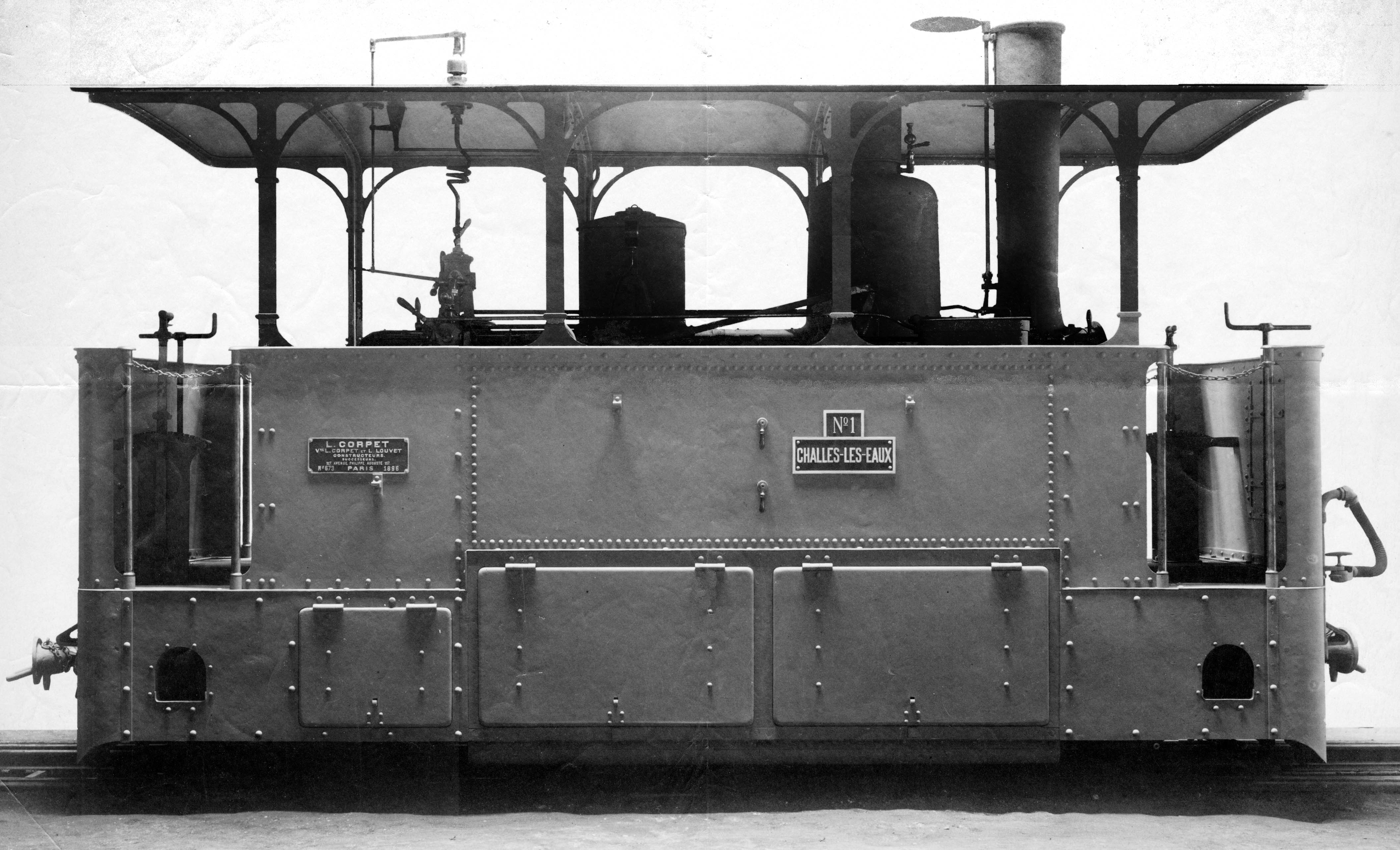 Locomotive à vapeur Corpet-Louvet numéro 673, construite 117 avenue Philippe Auguste à Paris et livrée en 1896 à la société anonyme Tramways de Savoie. Baptisée «Challes-les-eaux», n° 1.